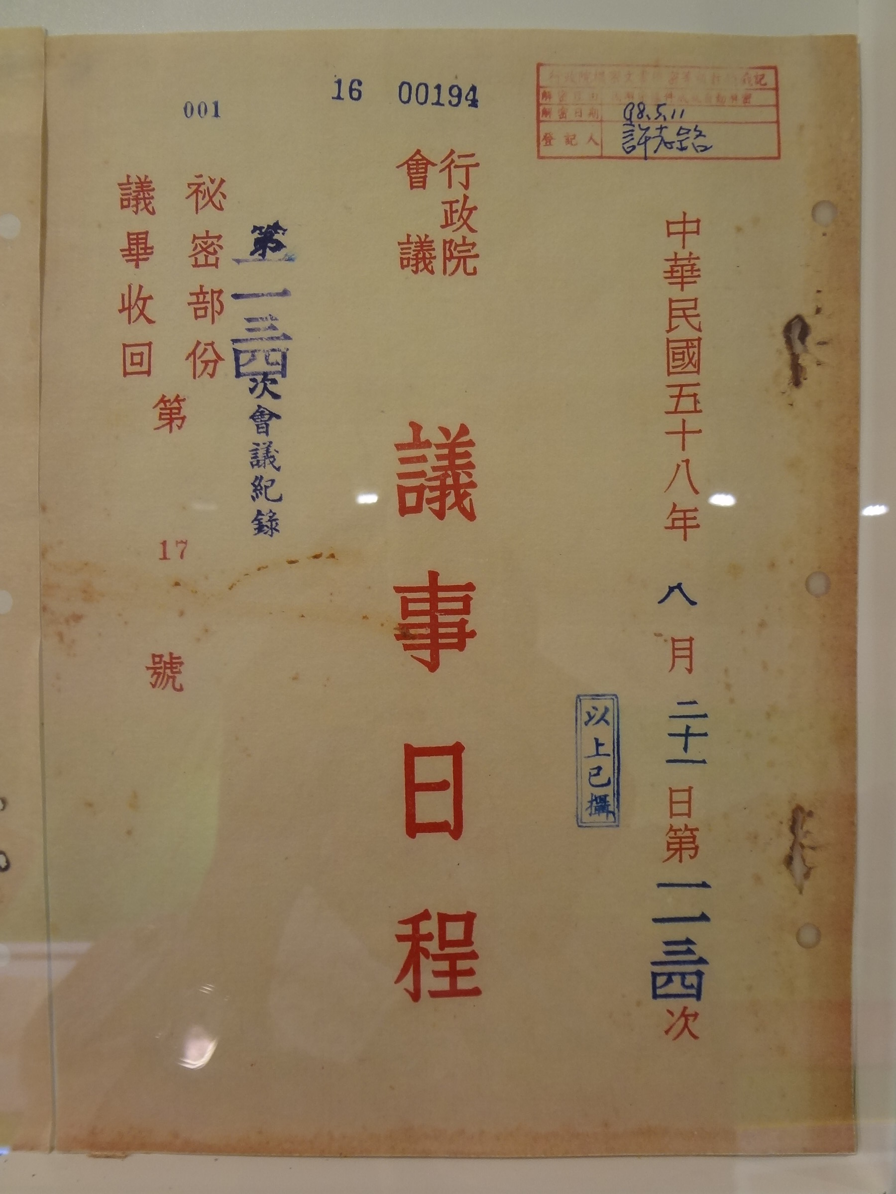 1969年（中華民國58年）8月21日，中華民國第1134次行政院會議議事日程。